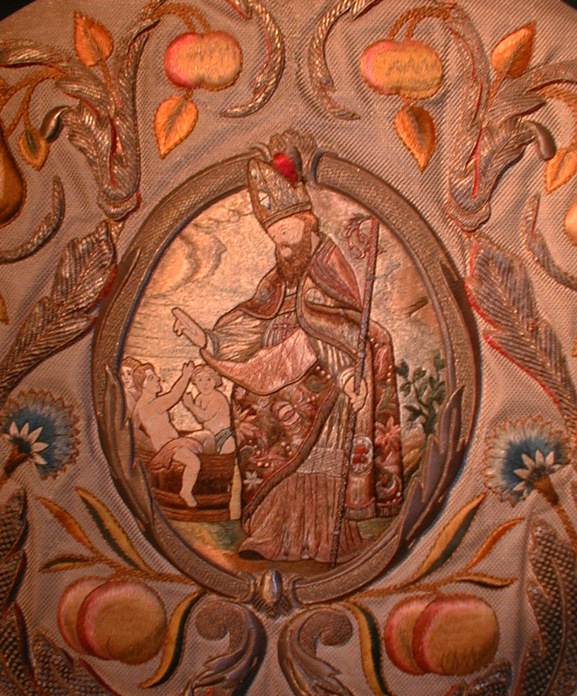 eigen foto